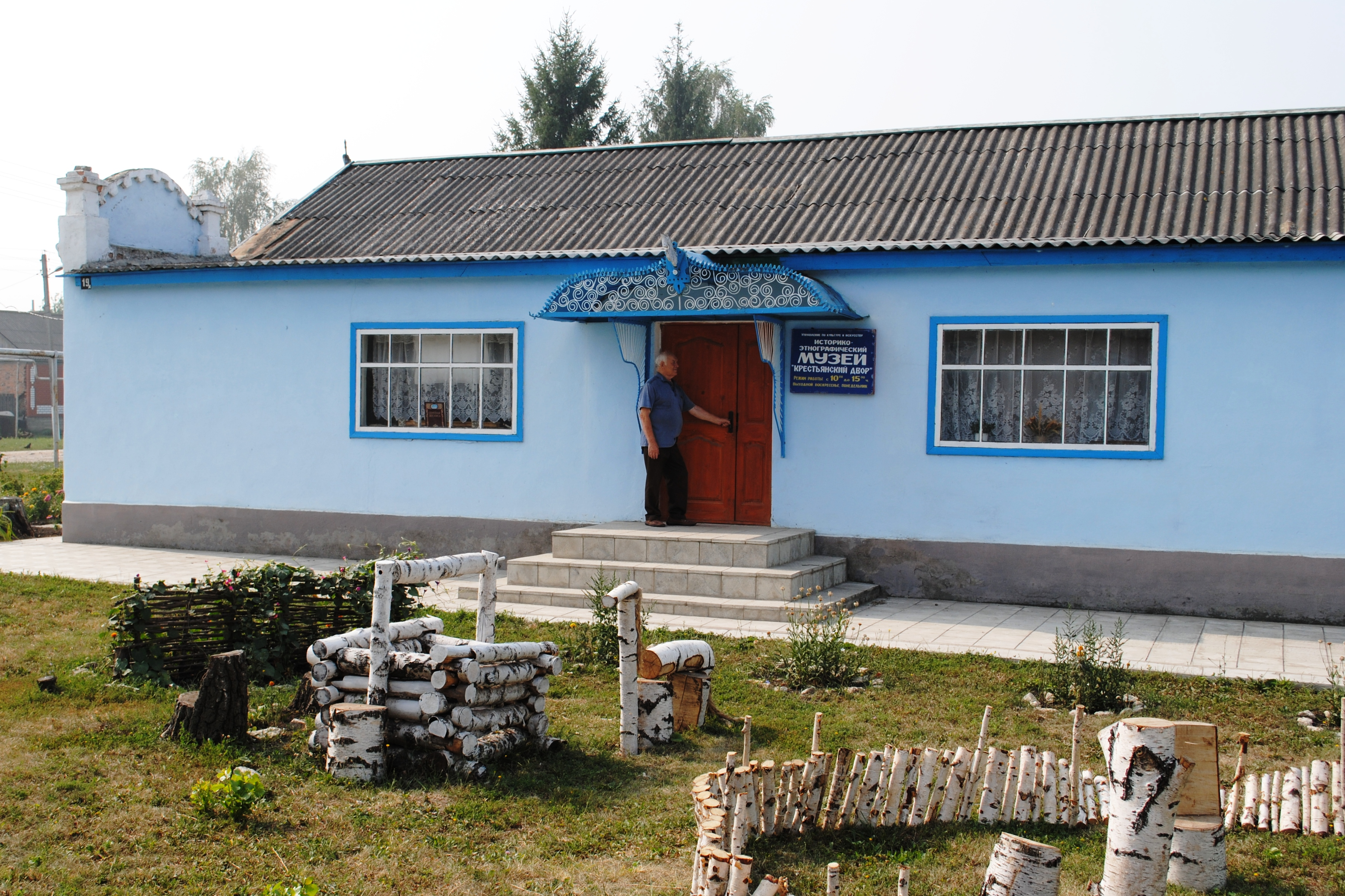 Музей Успенки